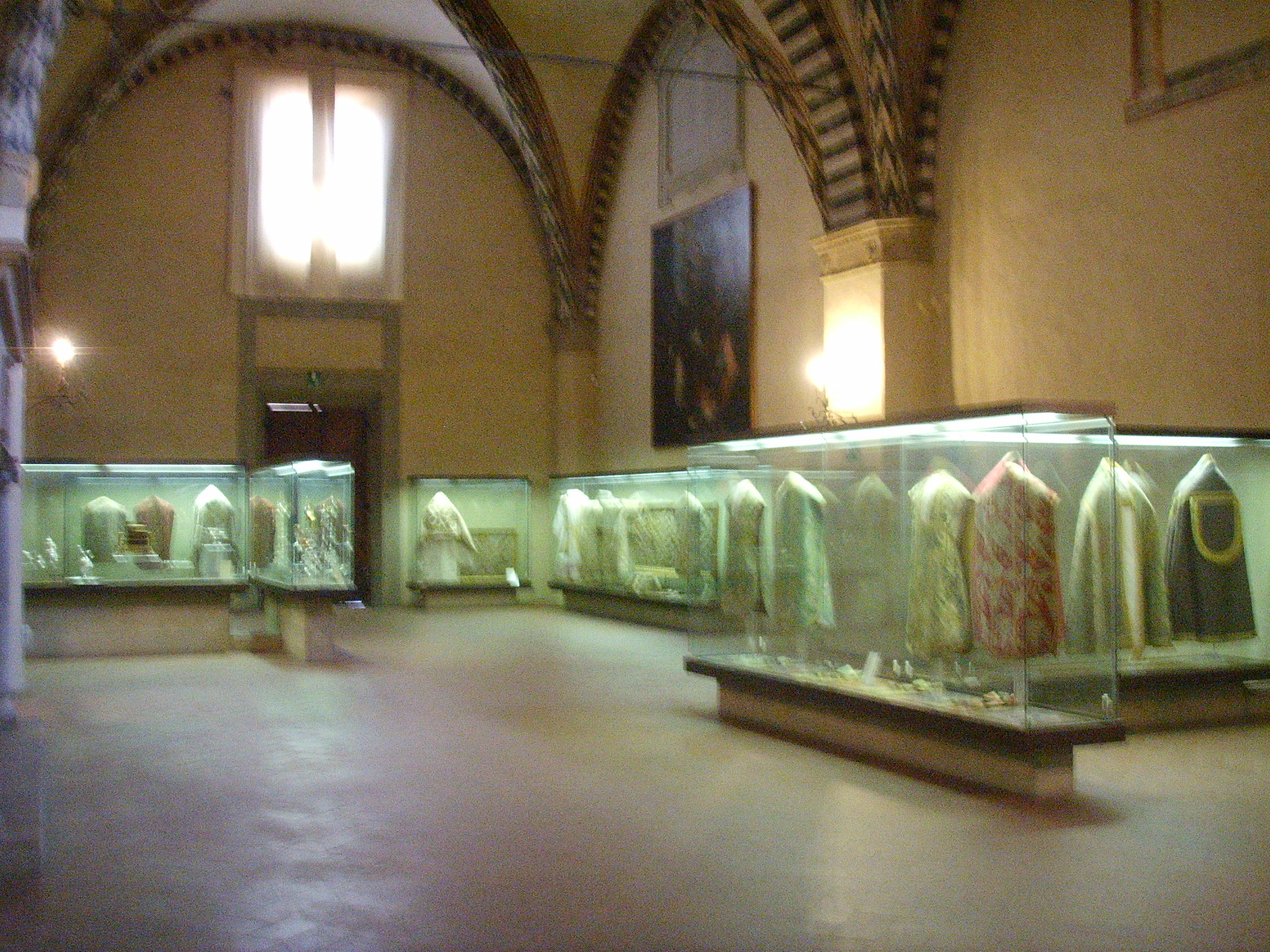 Santa Maria Novella church, refettorio, in Florence, Italy